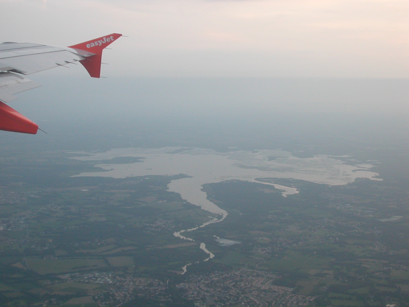 Le lac de Grand-Lieu vu du ciel